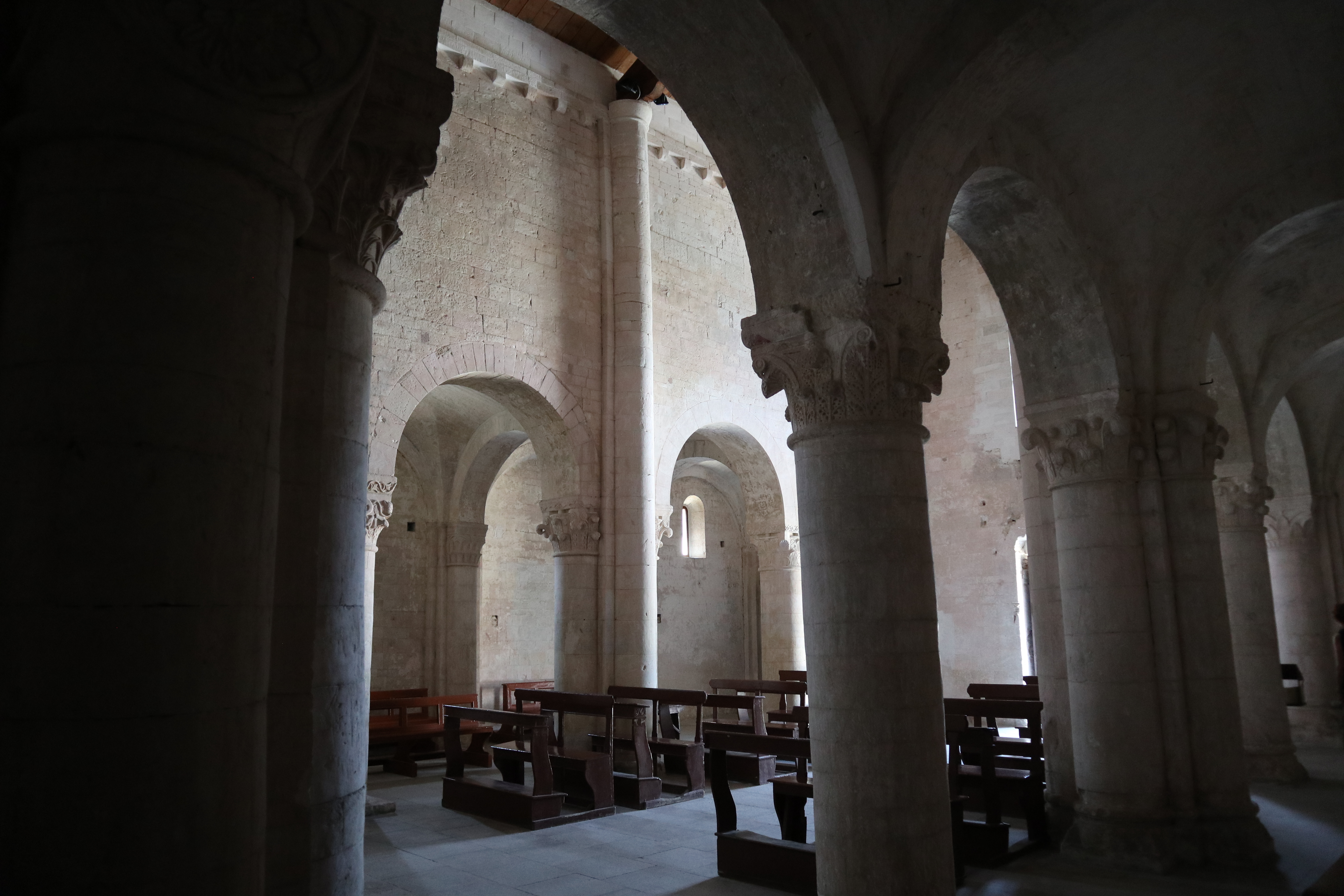 Interno